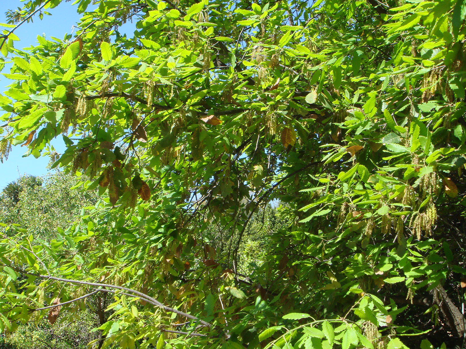 Quercus canariensis, Jardín Botánico de San Fernando, Cádiz, España